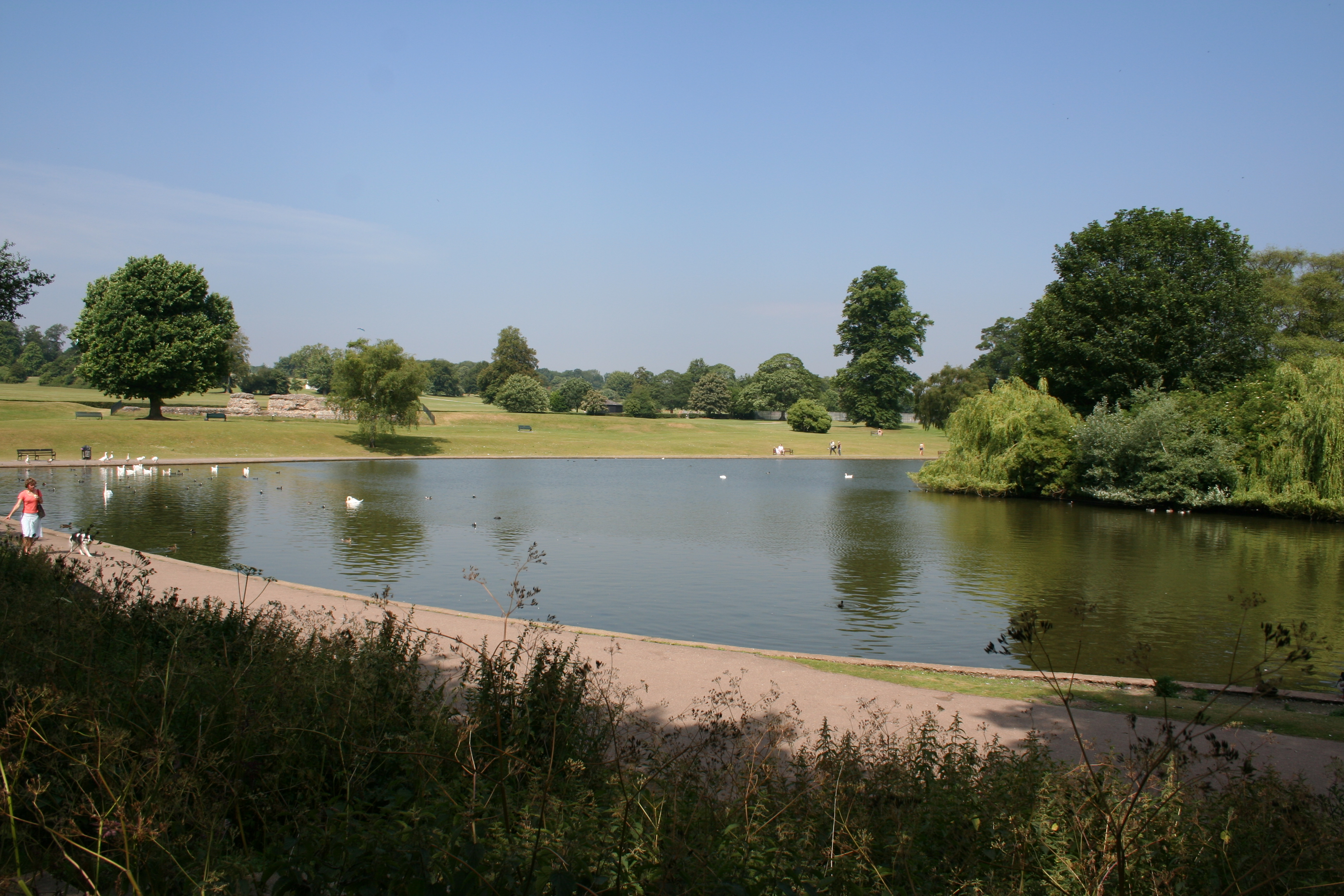 Verulamium_Park.jpg